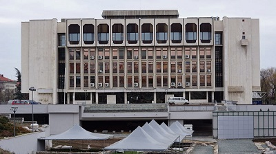 Регионална библиотека „Захарий Княжески“ посреща първите читатели в новата си сграда на 17 май 2007 г.